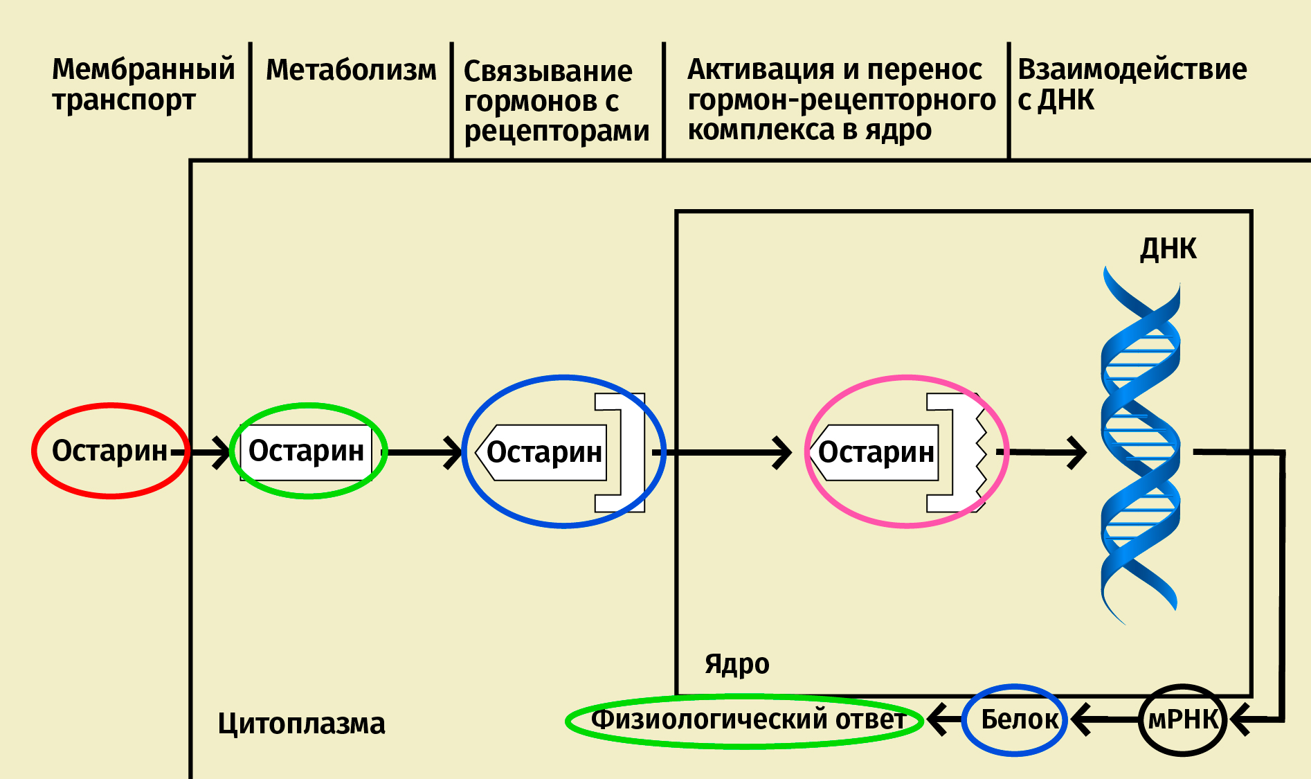 Схема фармакологического действия Остарина